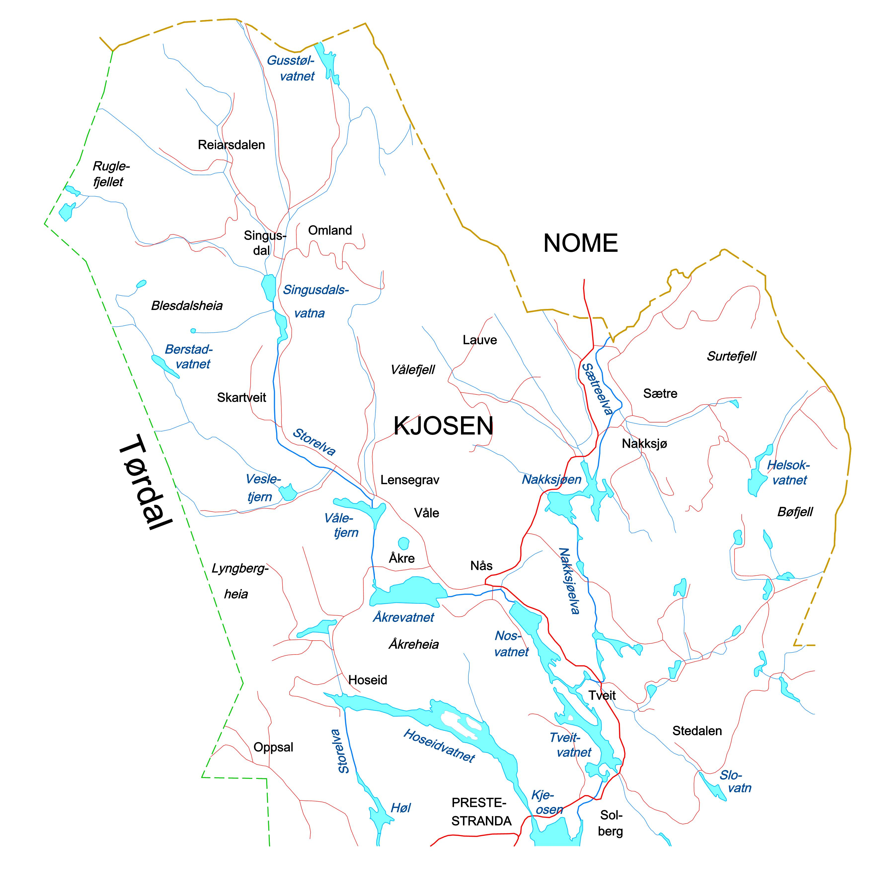 Kart over grenda Kjosen i Drangedal, Telemark, Norway